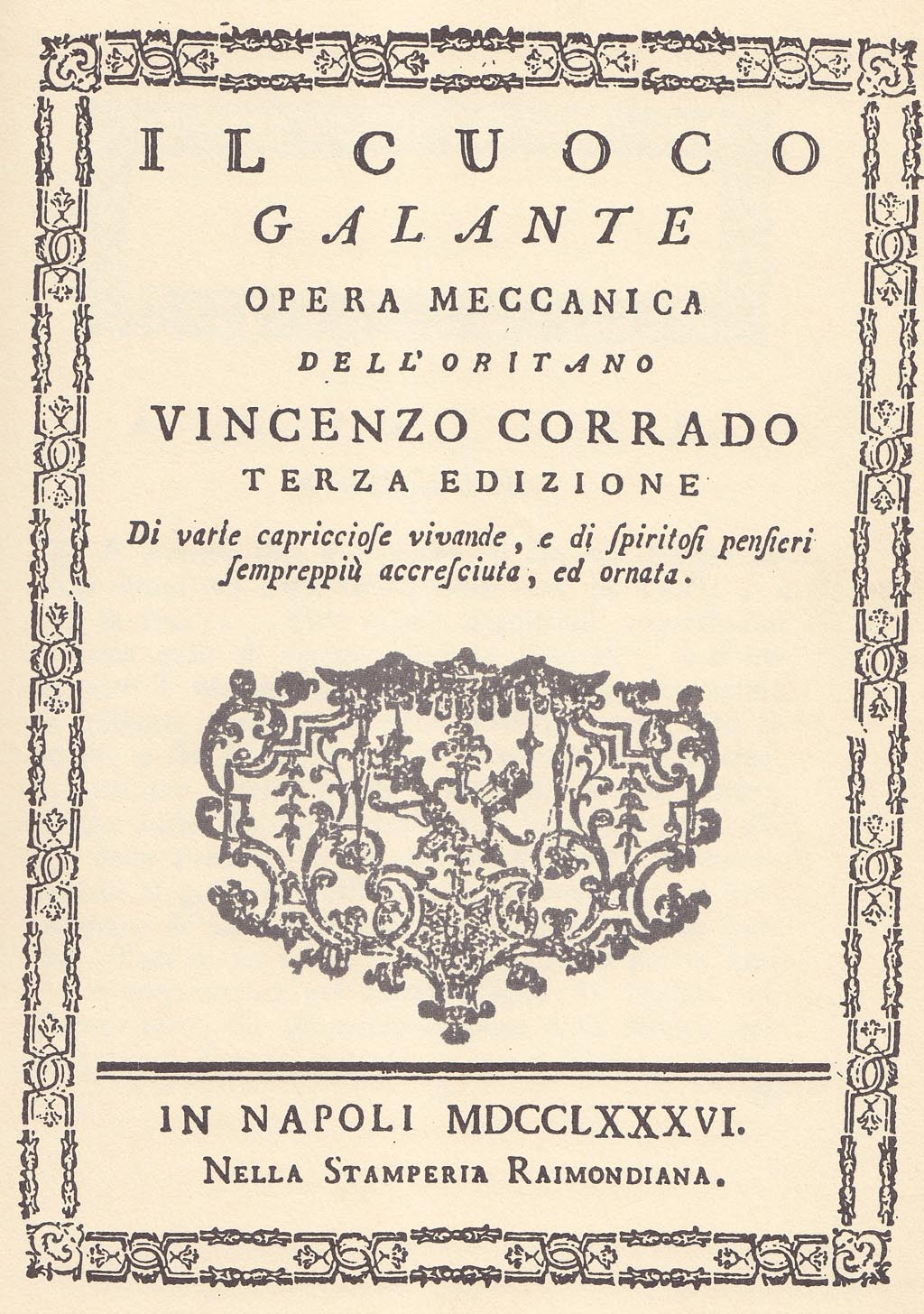 copertina libro tratto dall'antico libro del 1773 scritto da vincenzo corrado il cuoco galante